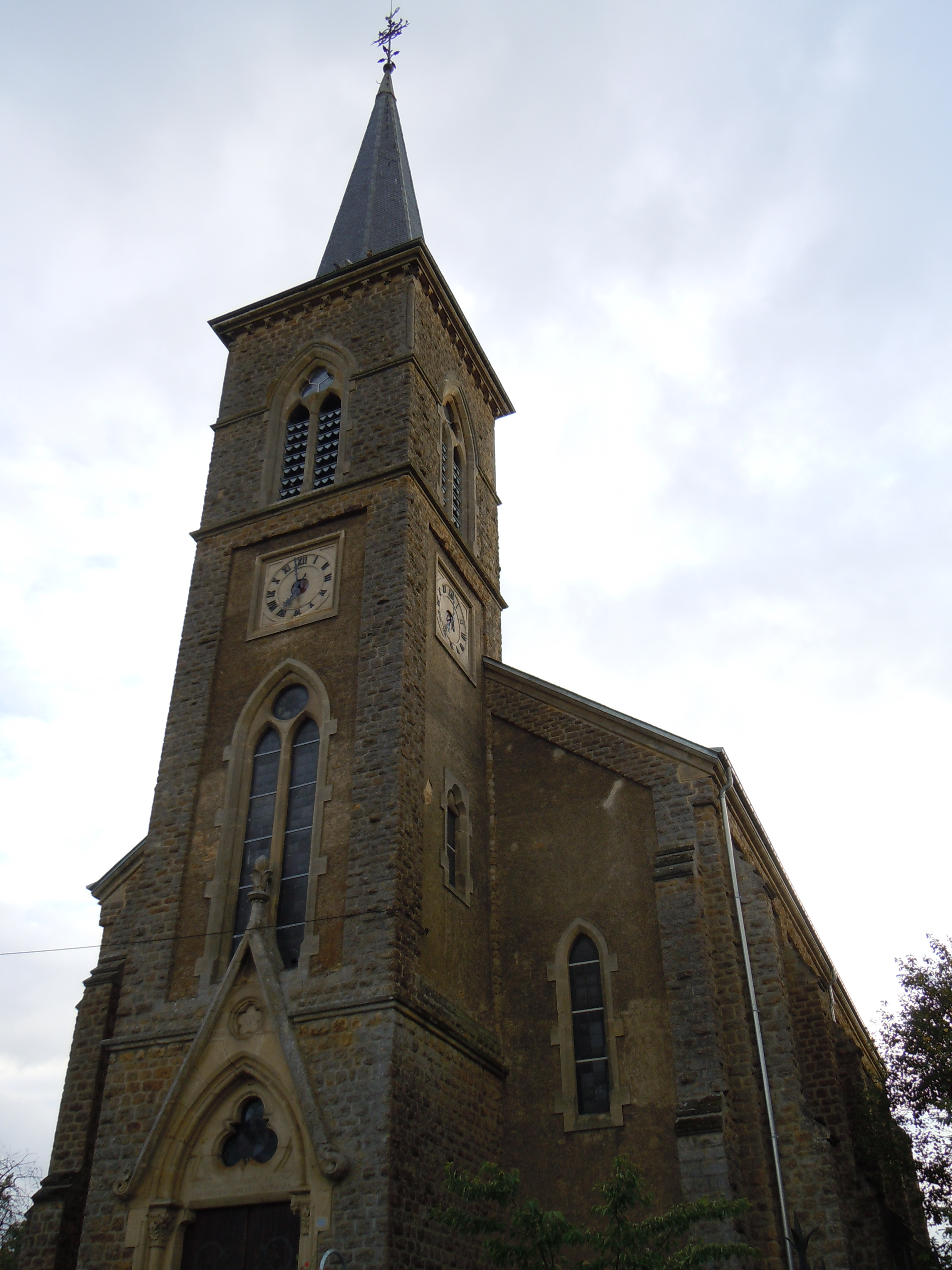 L'église Saint-Remacle dans le village belge de Hondelange